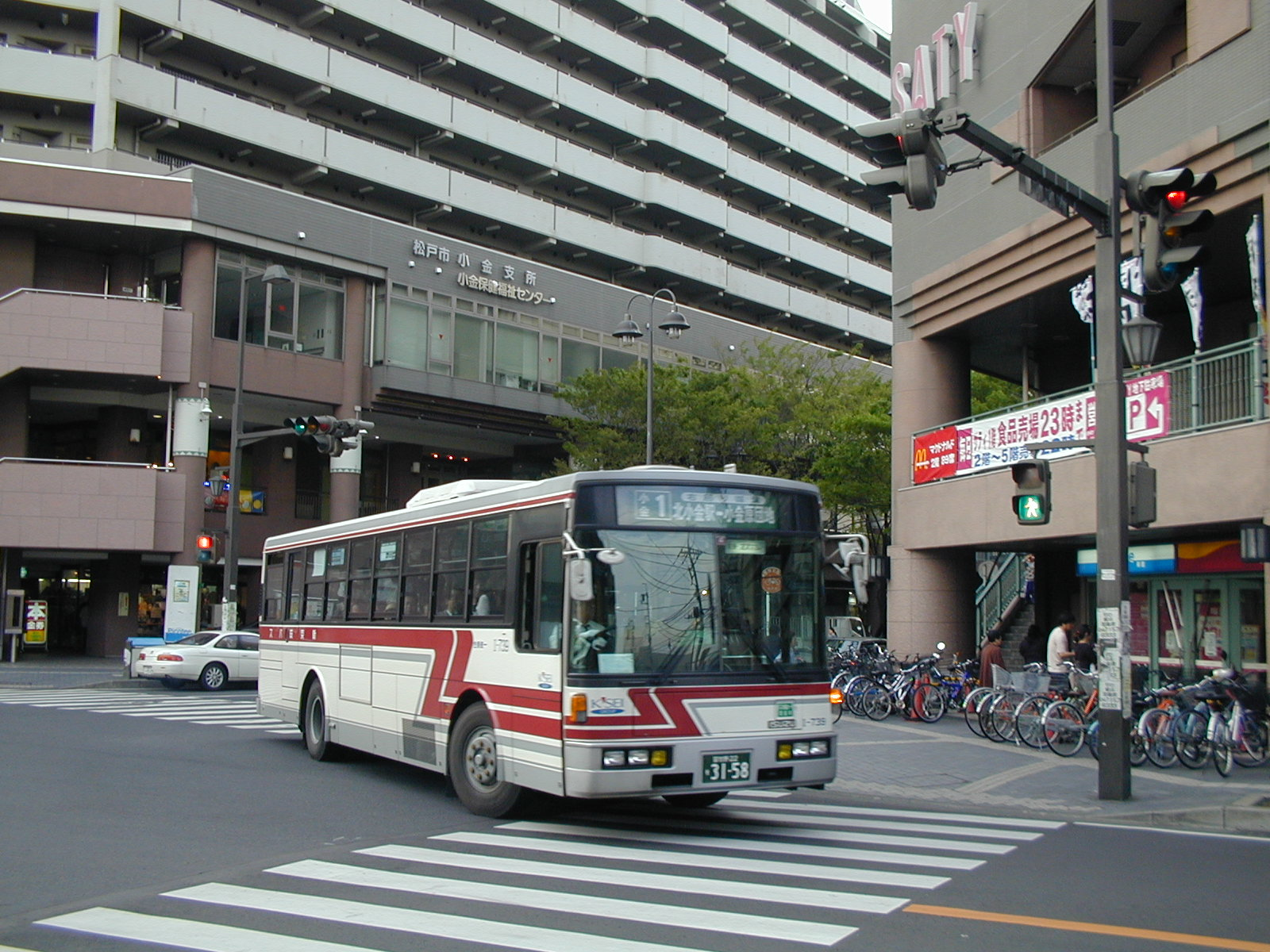 北小金駅前(2003/04/26)